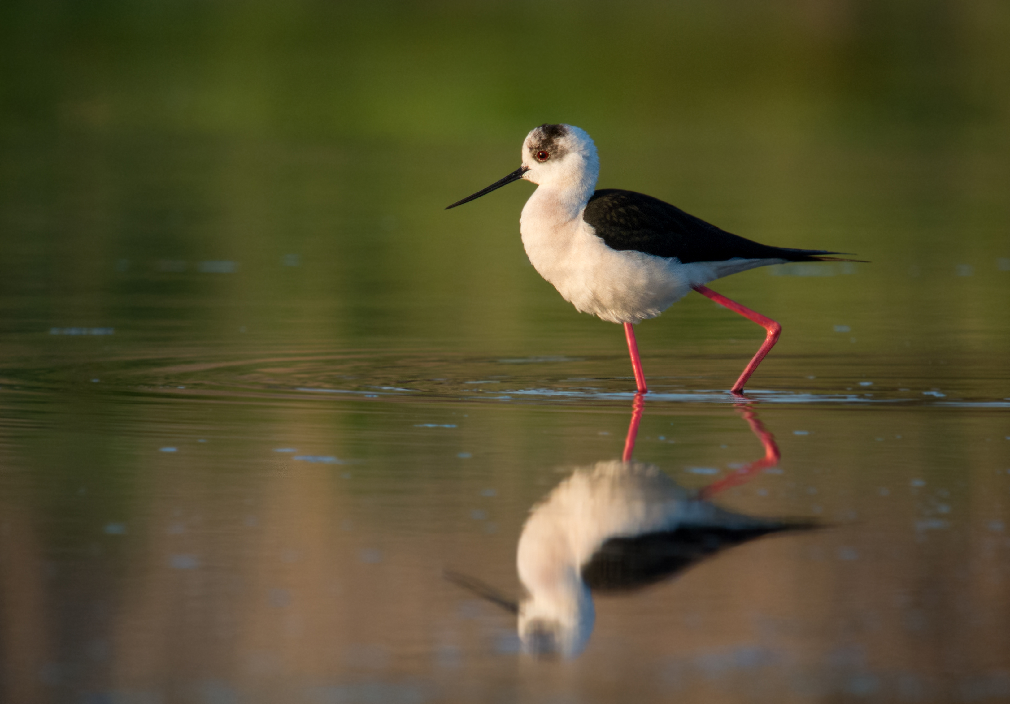 Digiscoping with Swarovski ATM 80 HD 30 X, Nikon 1V1 + 11-27,5 mm lens (Adapter DCB)